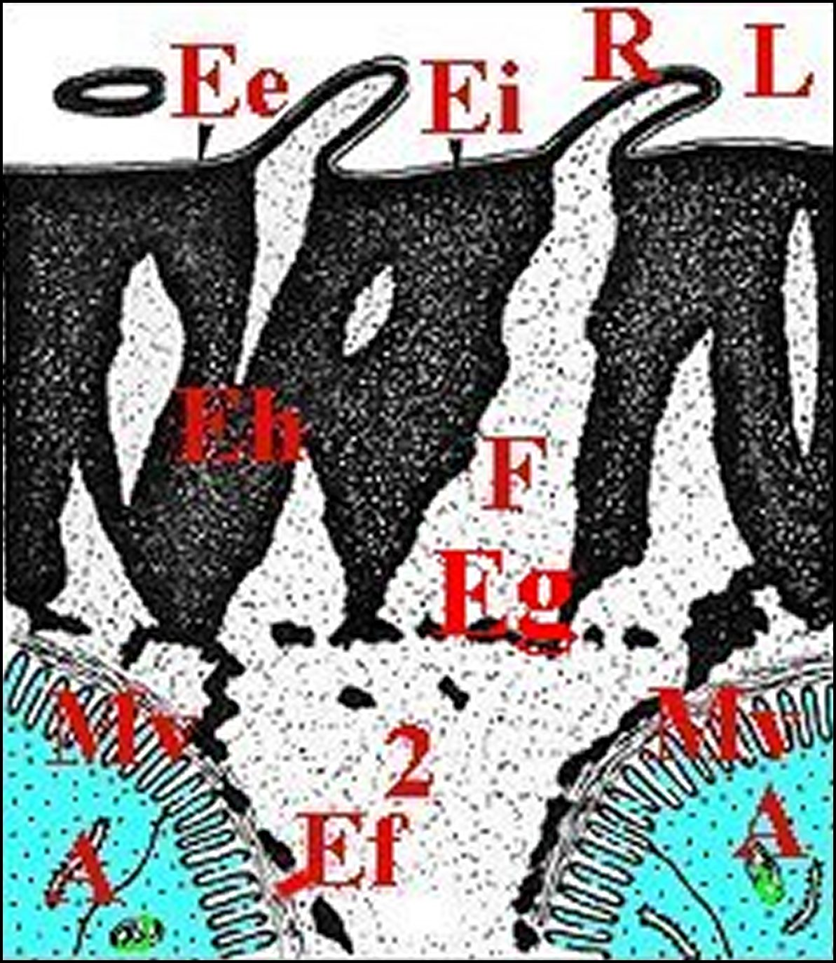 Paroi du tube séminifère en coupe schématisée montrant la cuticule, la chambre palpaire et l'épithélium chez Argyrodes cognatus